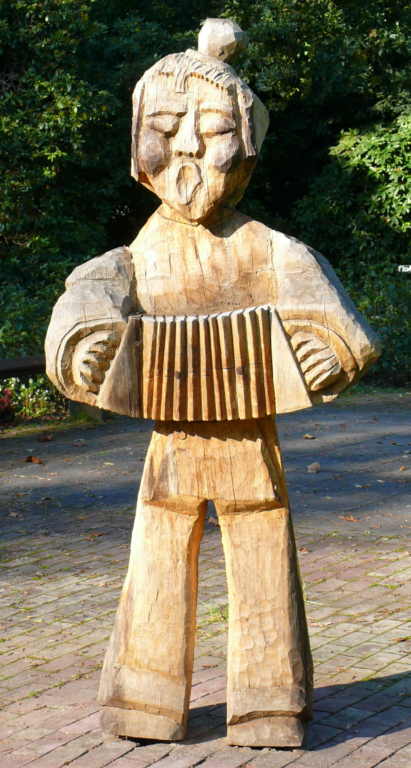 Hein Mück-Figur von Jürgen Buhmann, Manfred Beulke und Reinholf Heinen aus Eiche geschnitzt, im Rosengarten des Bremerhavener Bürgerparks